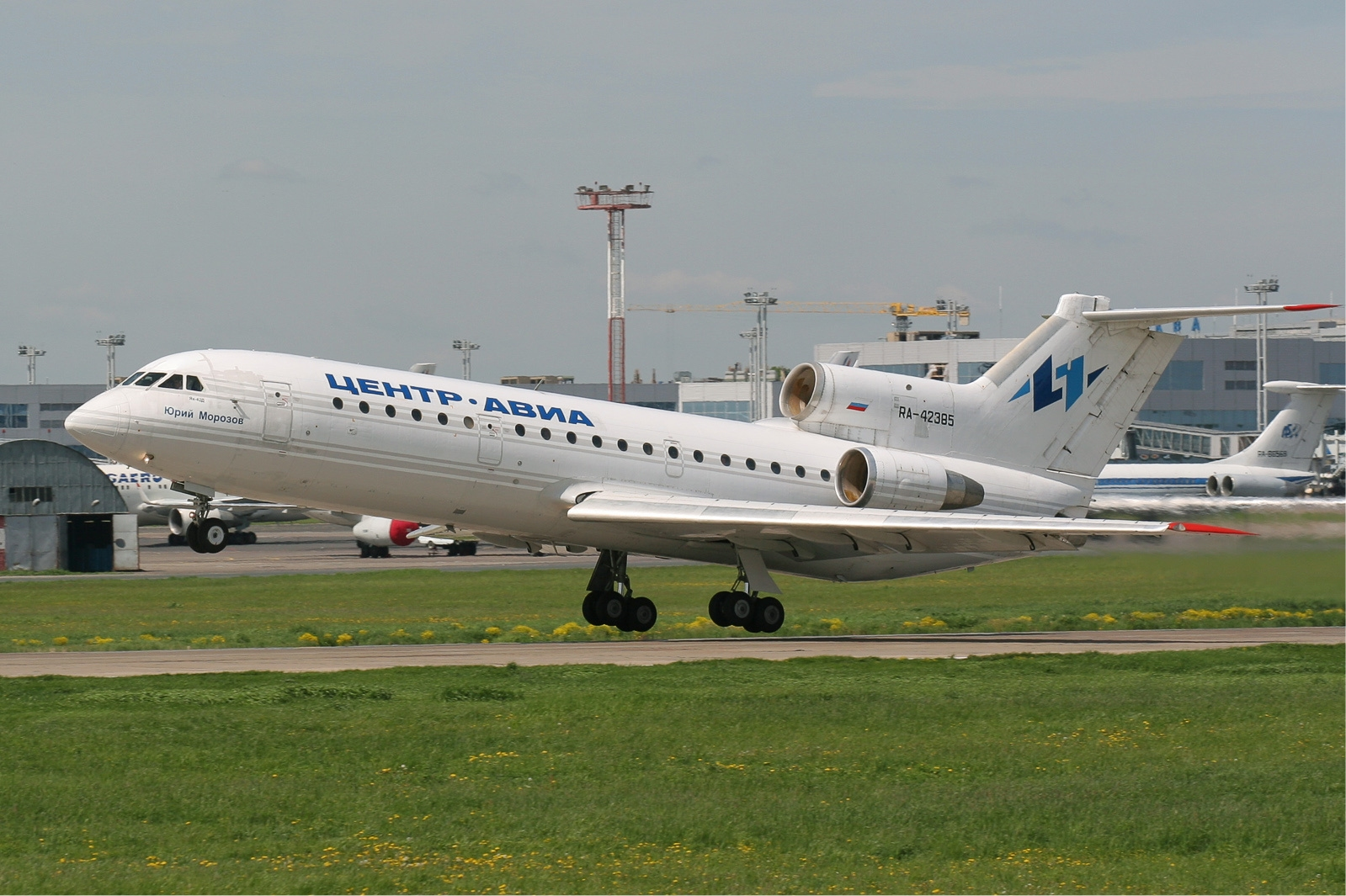 Centre-Avia Yakovlev Yak-42D